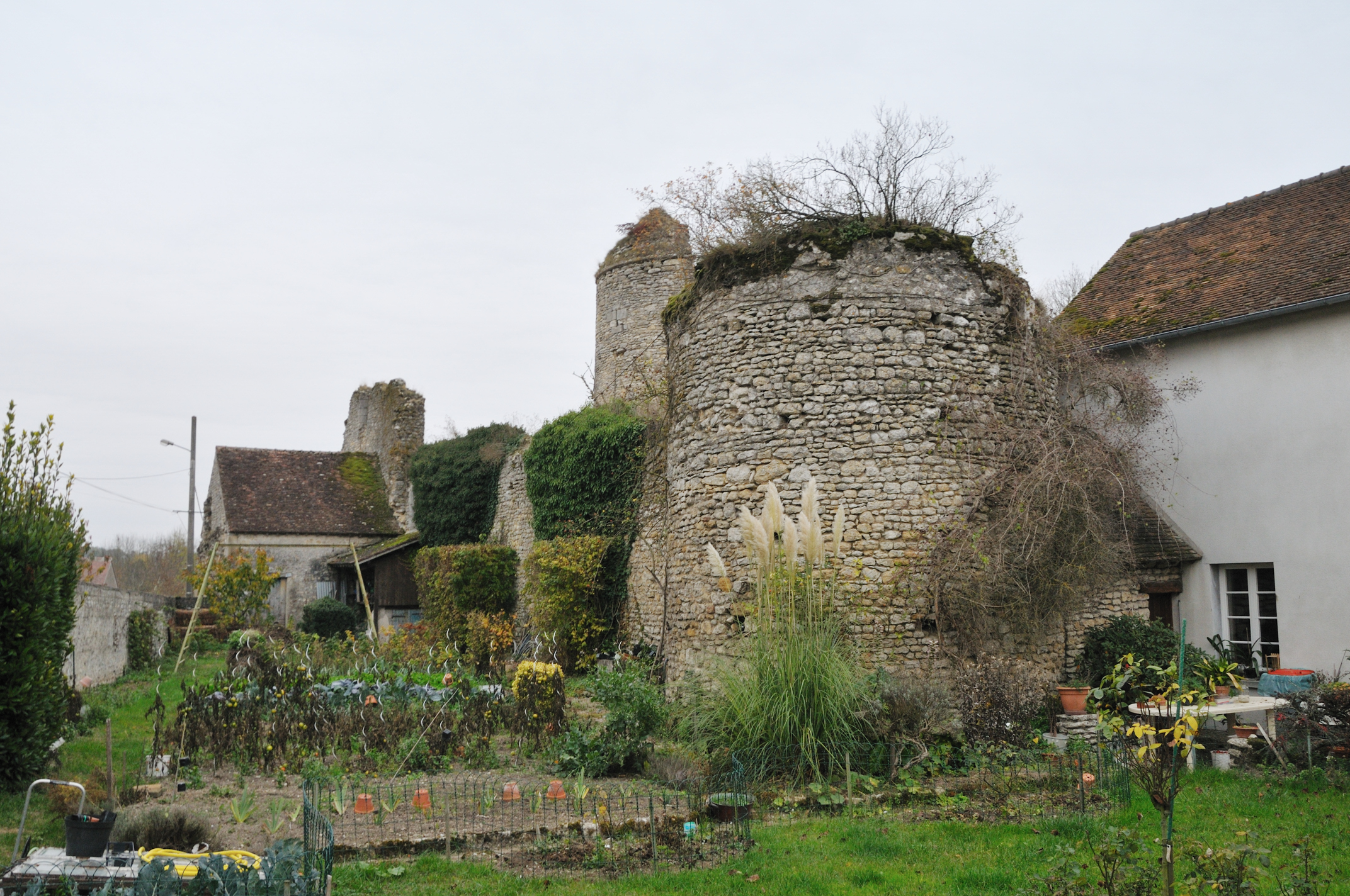 Château (ancien prieuré) de La Neuville-sur-Essonne, Loiret, France